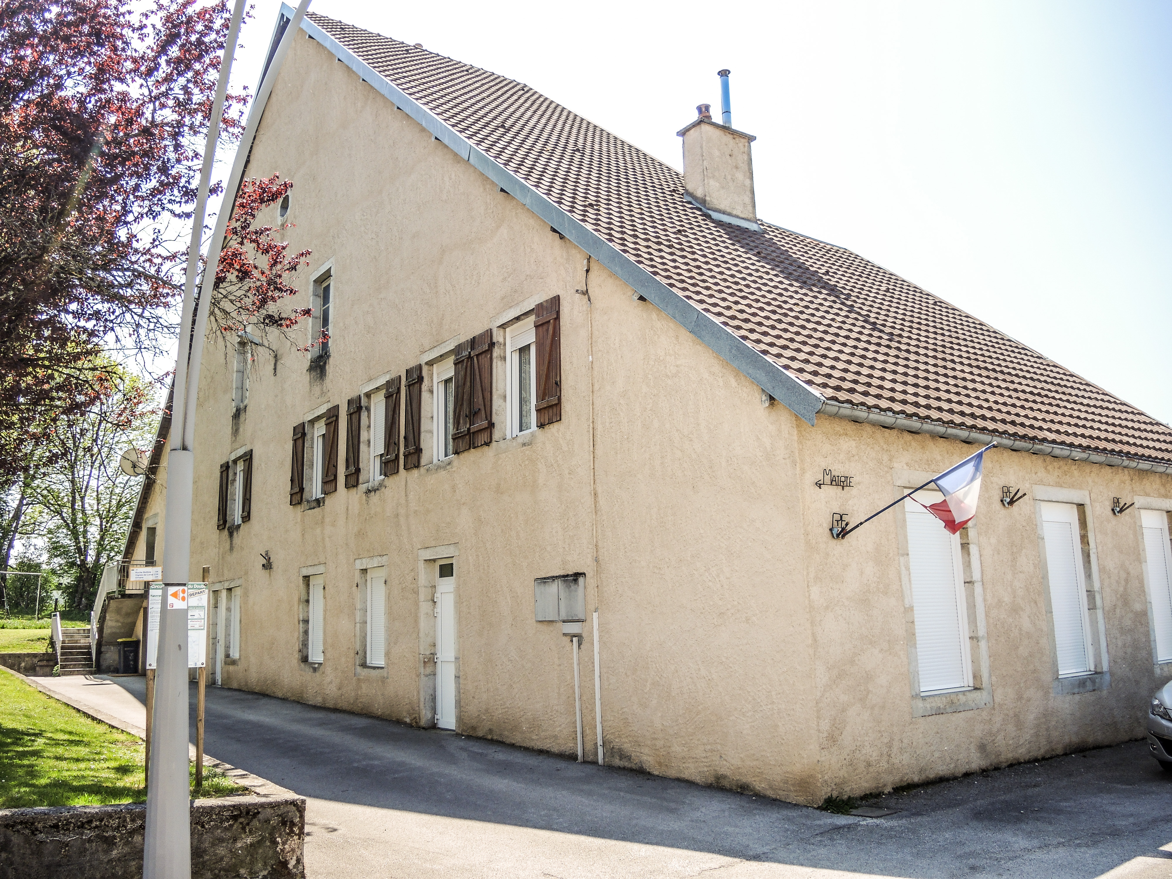 Mairie du village de Saules. Doubs